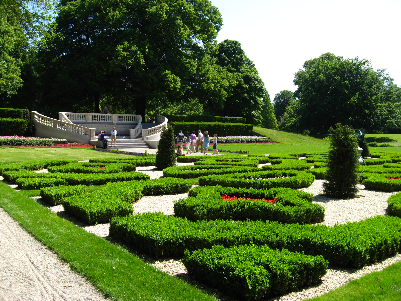 Bordestrap op landgoed Clingendael, ontworpen door L.A. Springer, eind 19e eeuw.